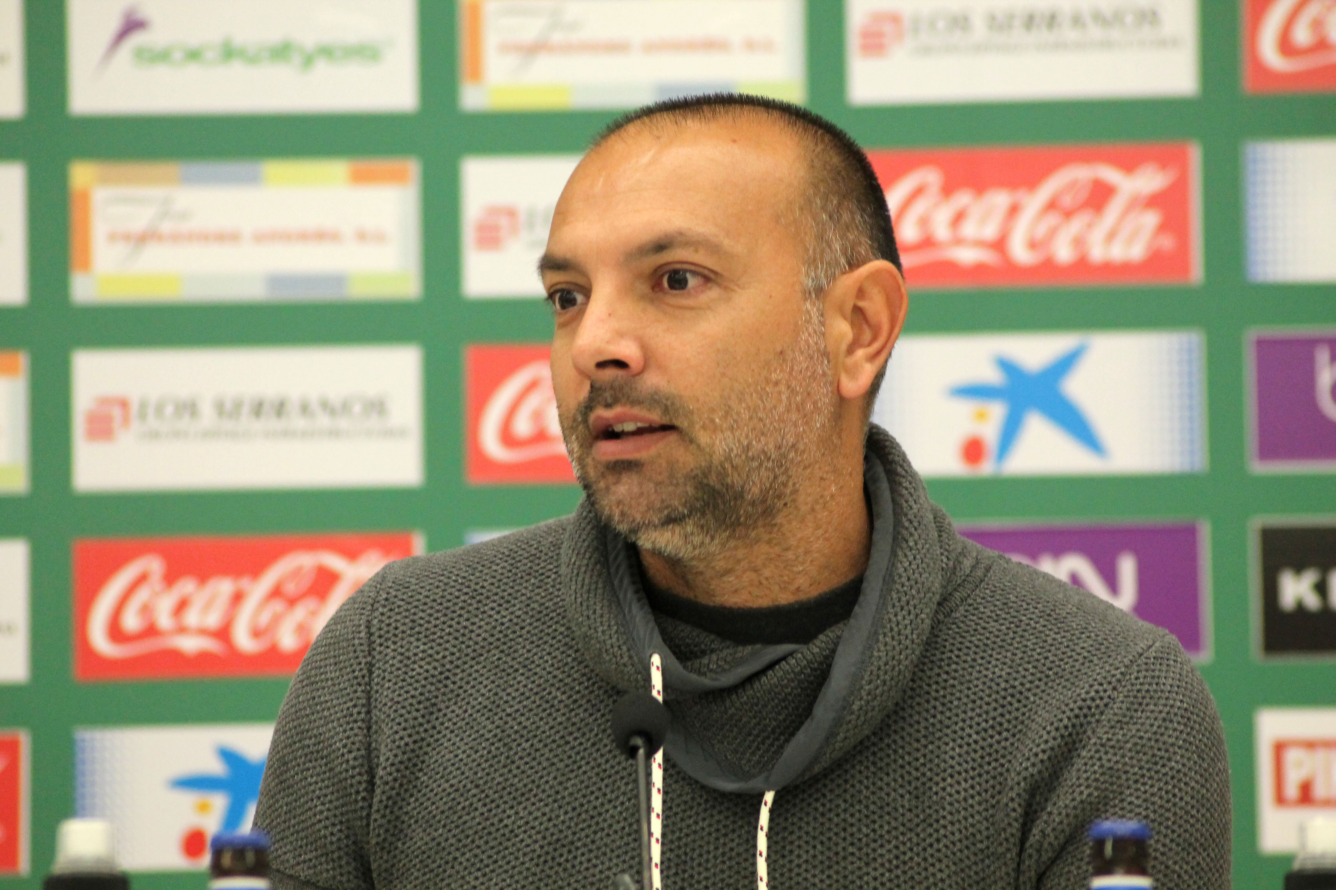 El entrenador Pepe Gálvez